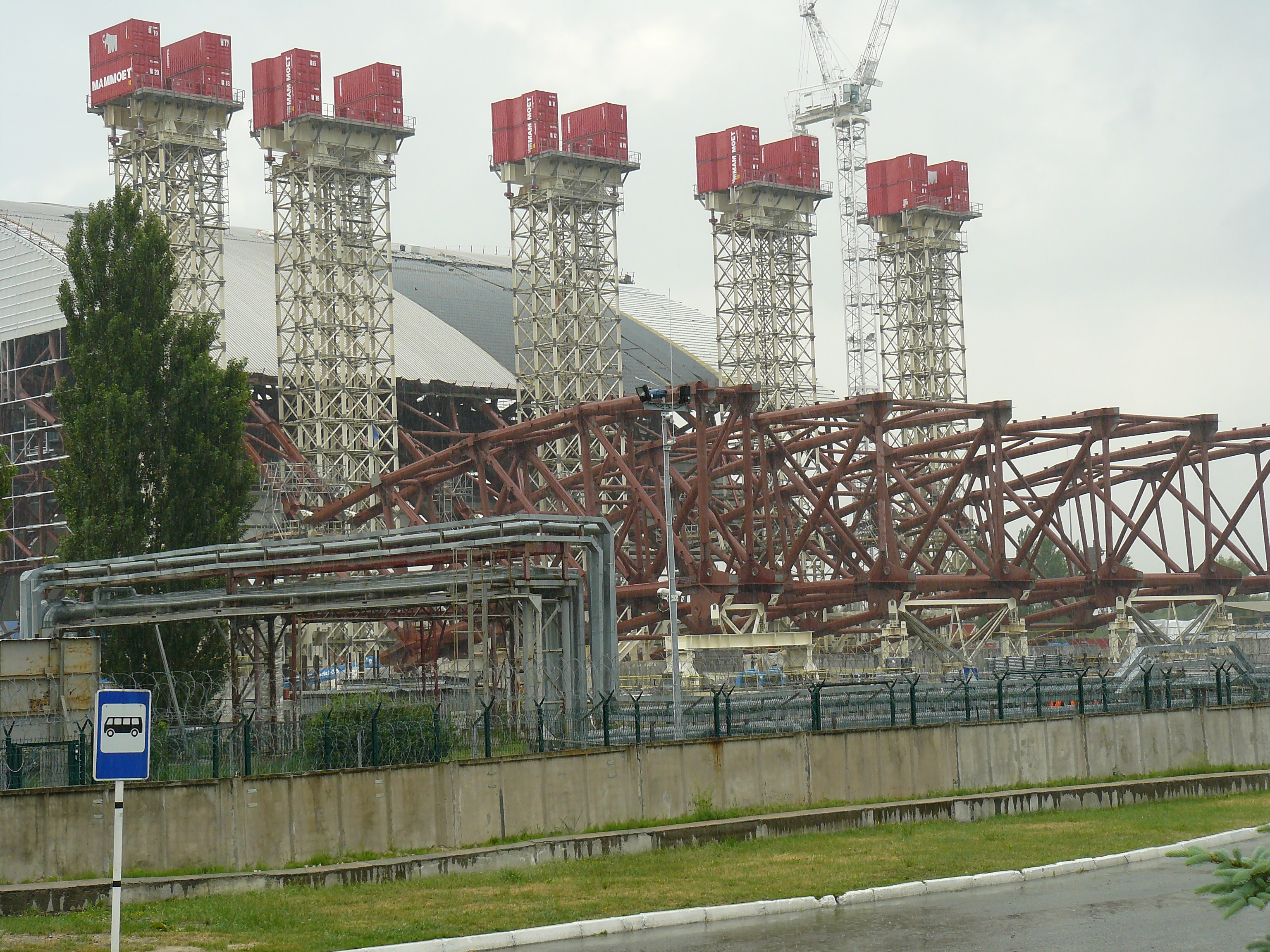 Вікіекспедиція до Чорнобильської зони